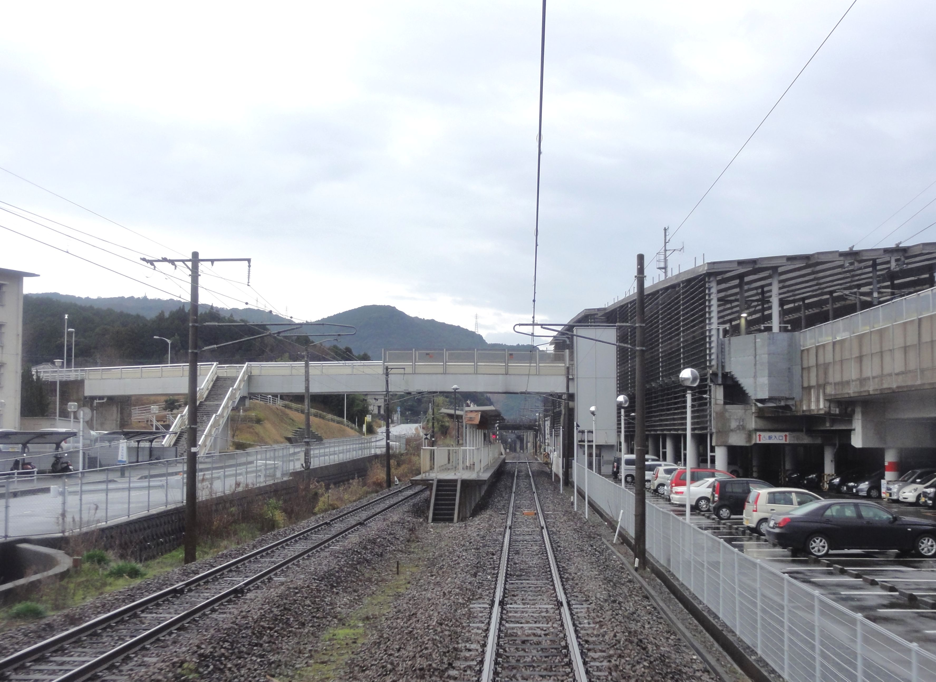 新水俣駅ホーム